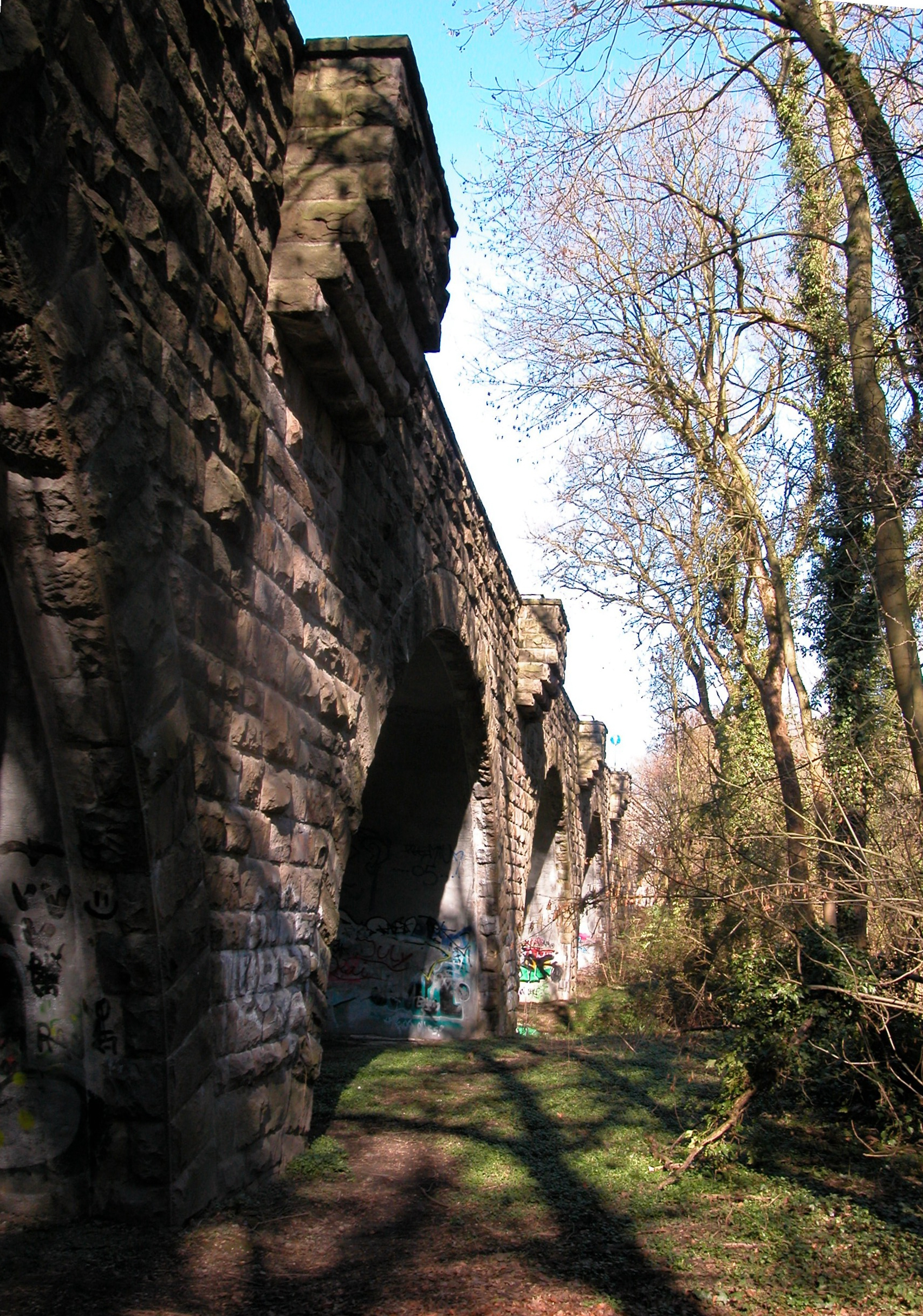 Rumbachtalbrücke der B1